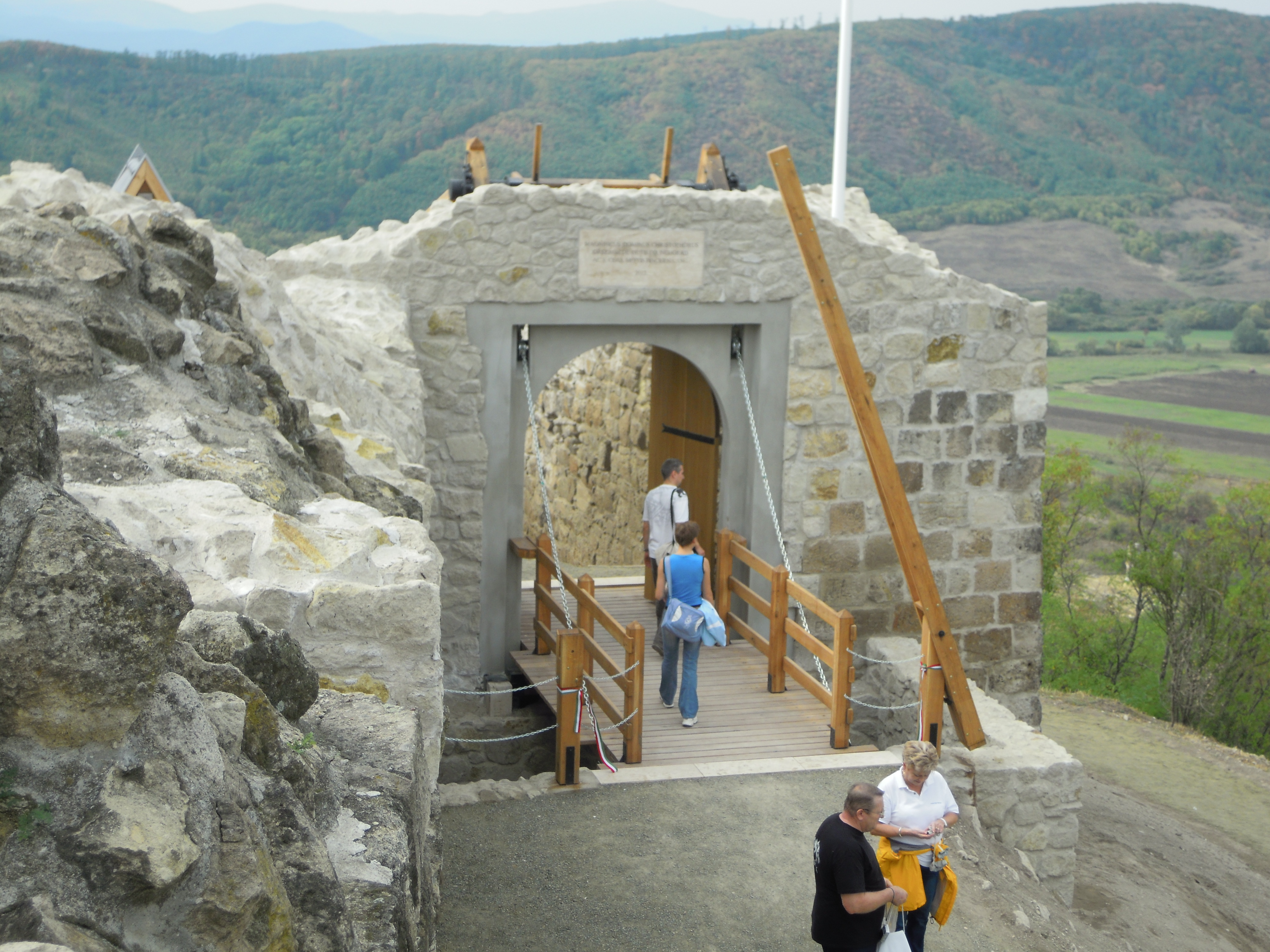 Siroki vár kapurekonstrukció kívülről This is a photo of a monument in Hungary. Identifier: 5838